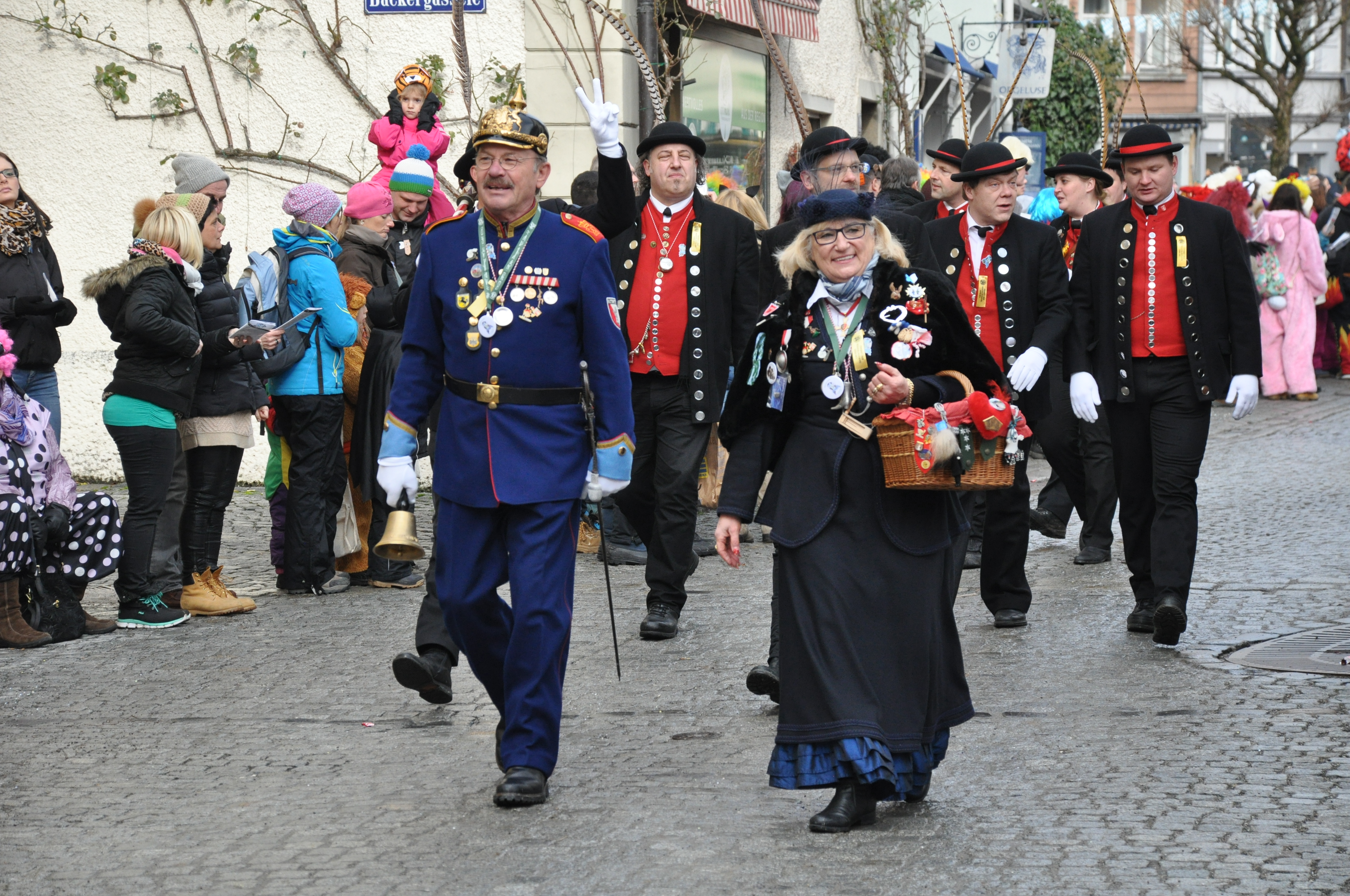 Kübelesmarkt Bad Cannstatt, Narrenfiguren: Küblerbüttel und Narrenmutter Fotografiert beim Großen Narrentreffen der Vereinigung Schwäbisch-Alemannischer Narrenzünfte (VSAN) in Lindau; Narrensprung am Sonntag, 24. Januar 2016.